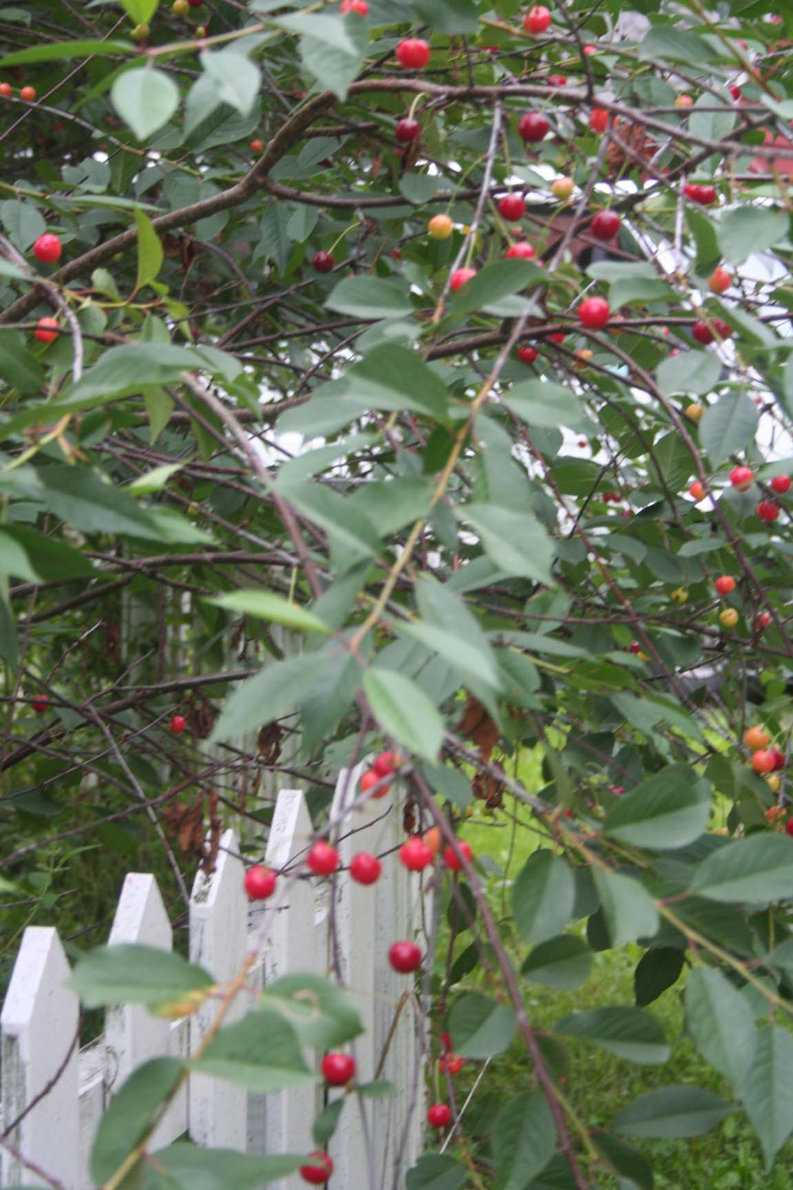 Hardangerkirschen2007